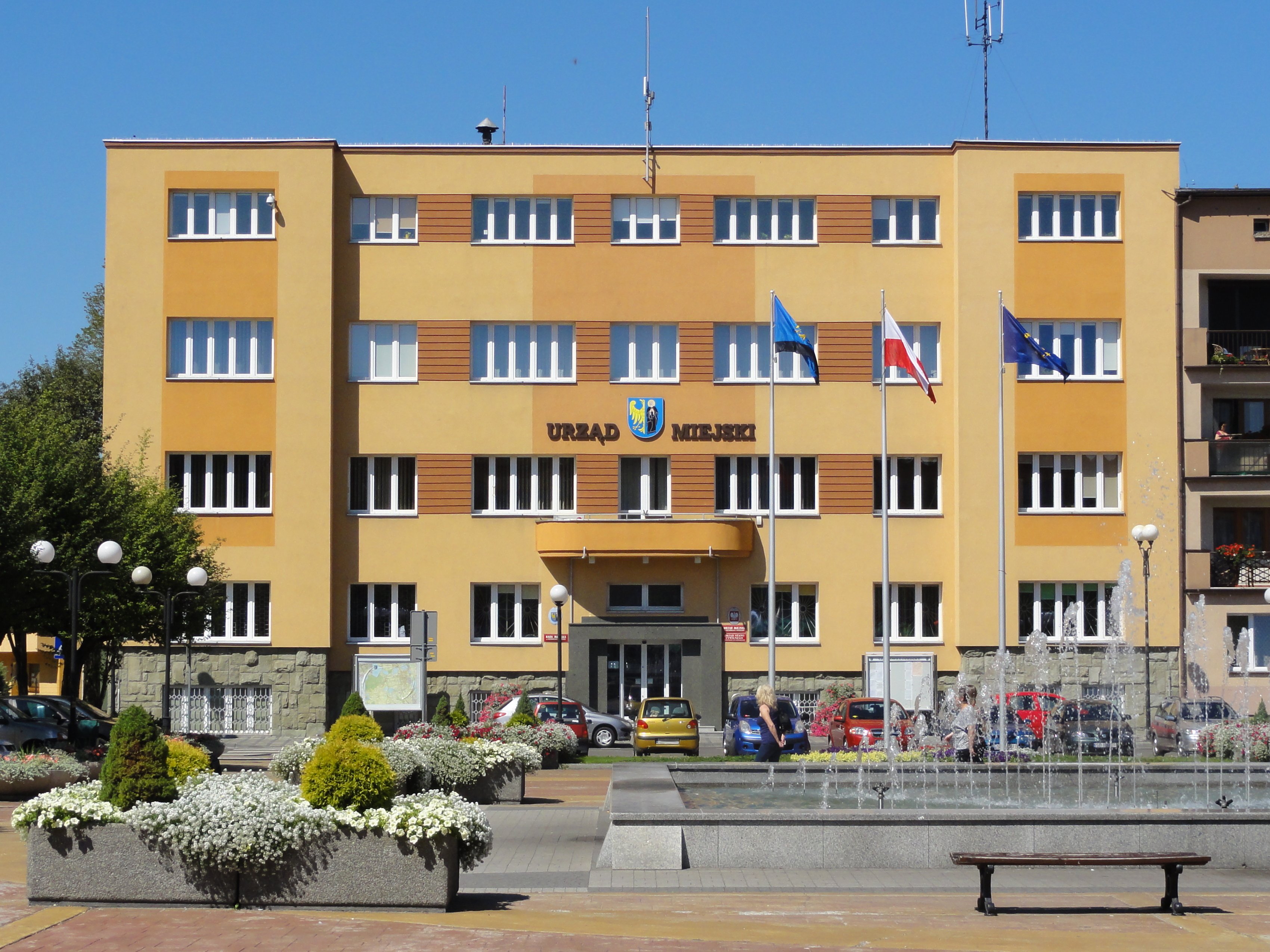 Urząd Miejski, Rada Miejska, Urząd Stanu Cywilnego w Czechowicach-Dziedzicach